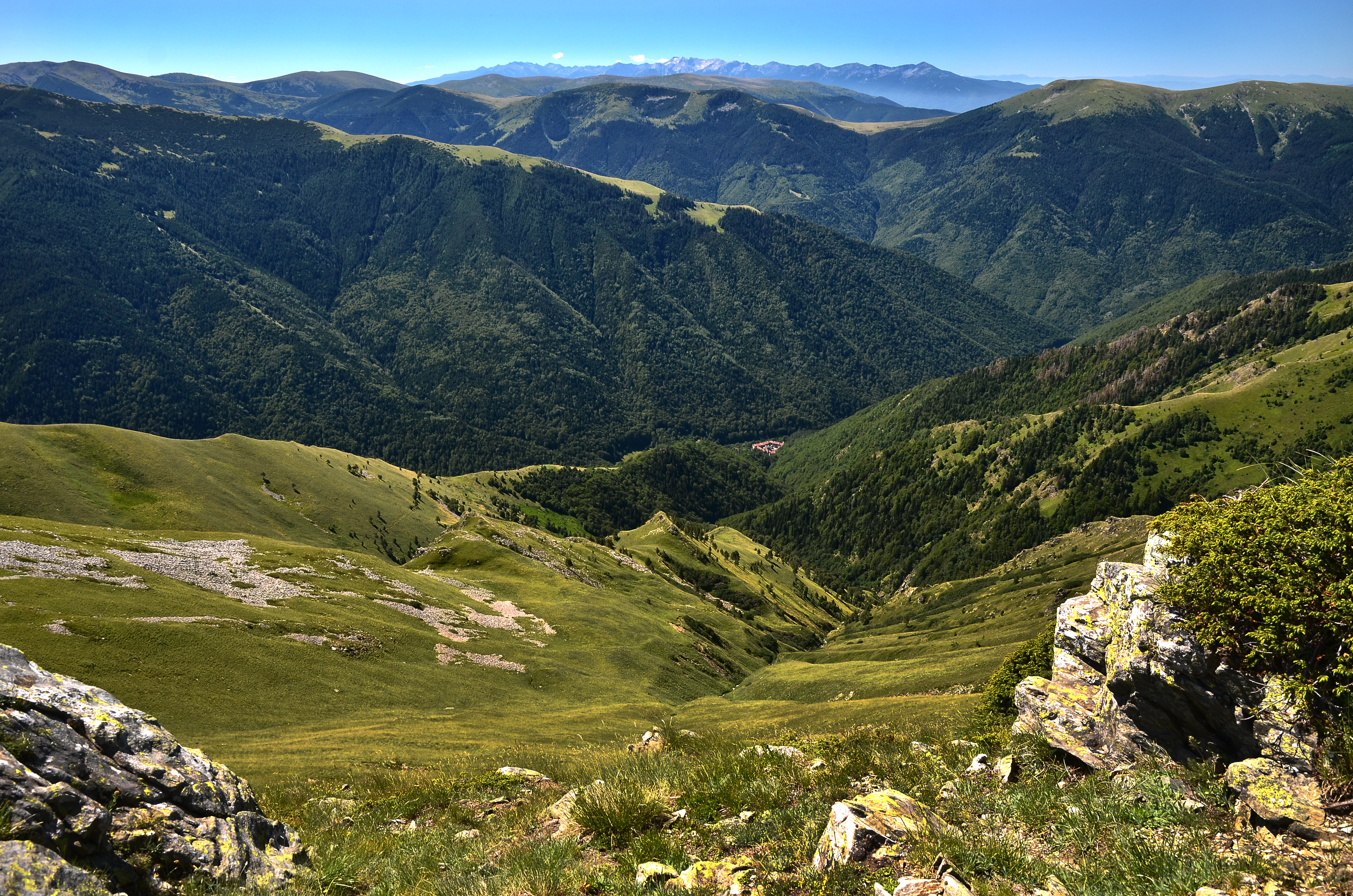 Рилски манастир